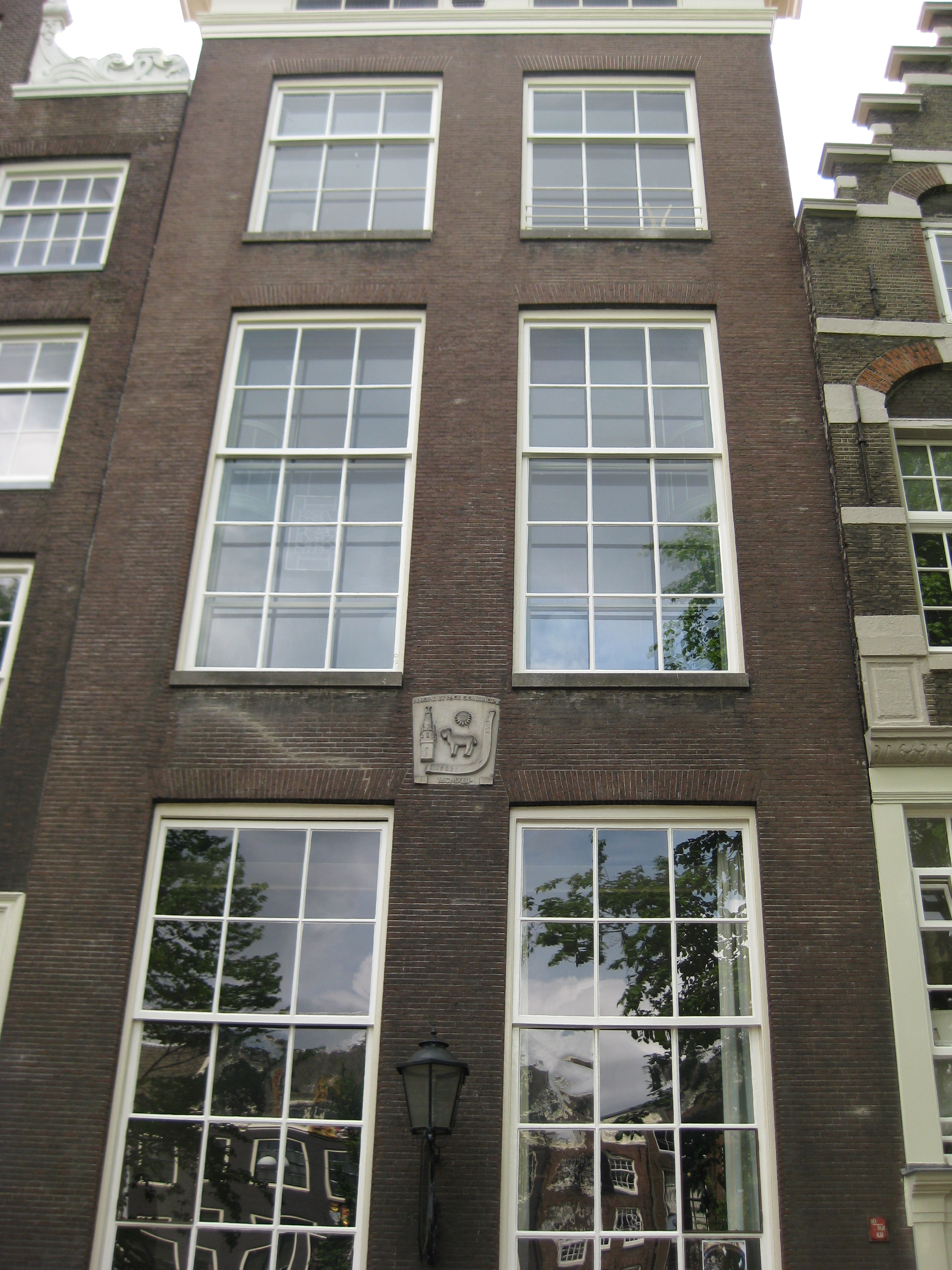 Singel 452, Amsterdam. Onderdeel van de Singelkerk